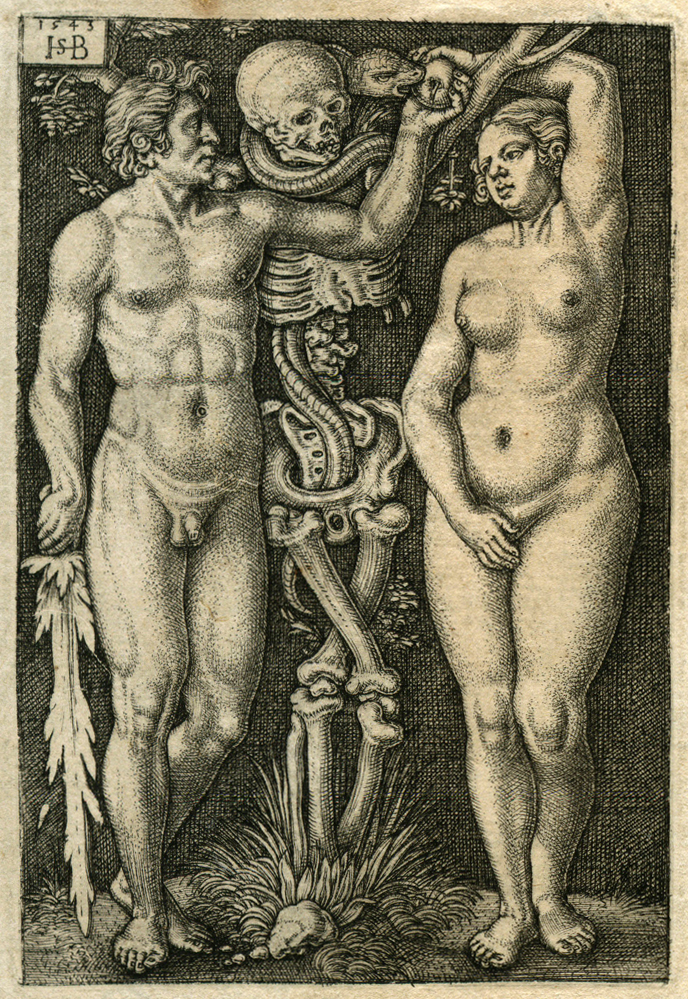 Beham, (Hans) Sebald (1500-1550): Adam und Eva/Adam and Eve. Kupferstich/engraving, 1543. Ca. 8,2 : 5,6 cm. Bartsch 6; Pauli 7/III (von V); Hollstein 7. Ausgezeichneter, bis in alle Details klar zeichnender Abdruck des schönen Blattes; links vereinzelte weiße Haarlinien. Mit bis zu ca. 10 mm breitem Rand. Geringfügige Randmängel oben hinterlegt; rechts unten winzige fachmännische Restaurierung; ein kleiner Braunfleck außerhalb der Darstellung.